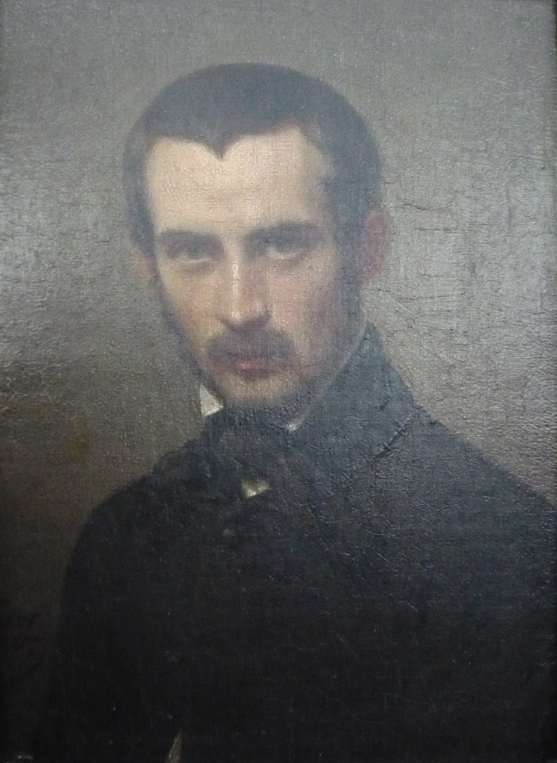 1 Kehren - Porträt Joseph Kehren (1817–1880) - in Freundschaftsgalerie von Einzelbildnissen der Düsseldorfer Malerschüler und ihren Freunden (Vermächtnis des Künstlers)